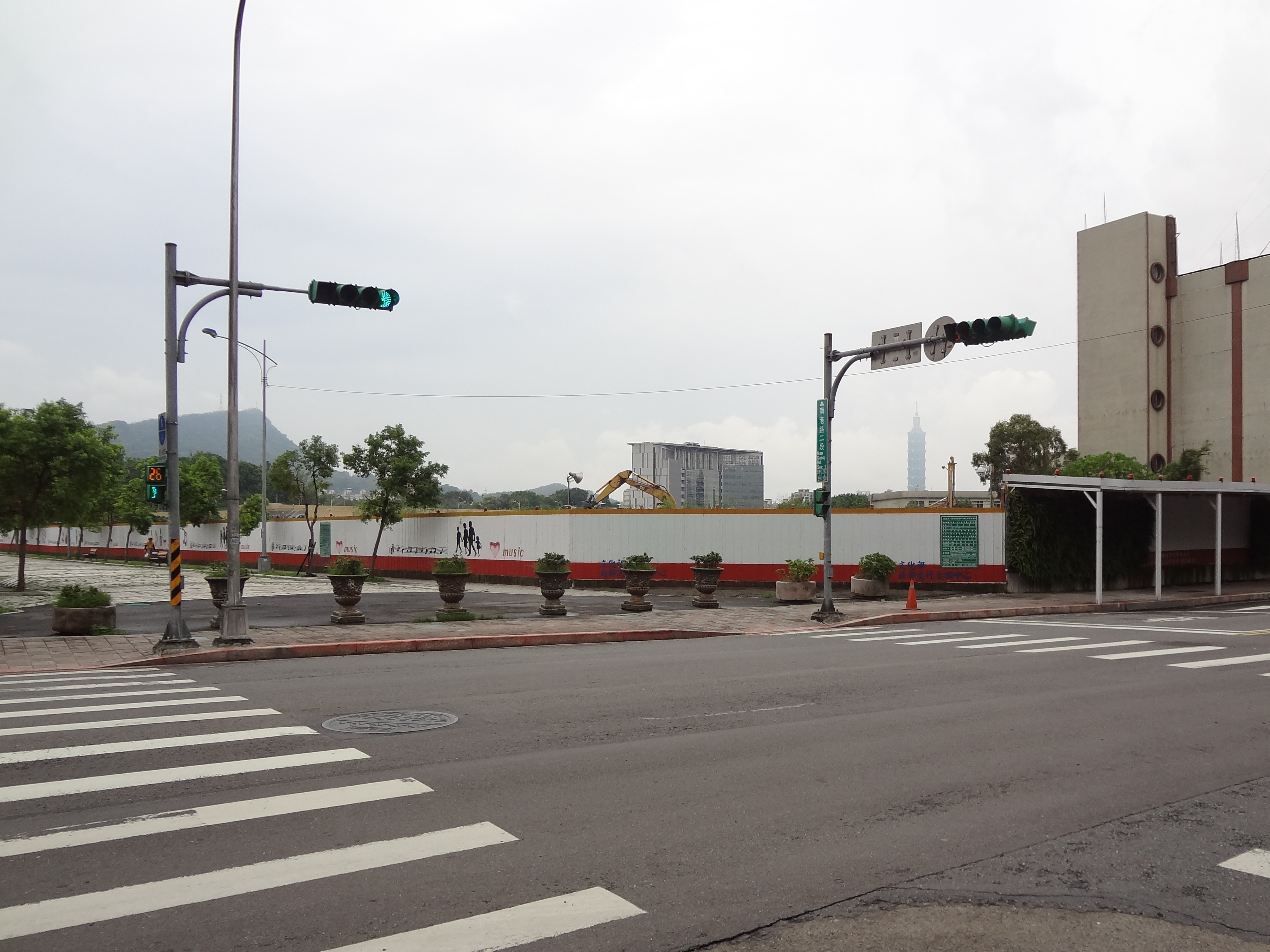 中文（台灣）: 臺北市南港區南港路二段，中華民國文化部北部流行音樂中心工地。